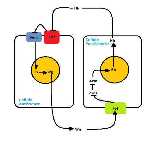 Implication de l'ensemble des gènes de polarité segmentaire pour la segmentation dans l'embryon de la Drosophile